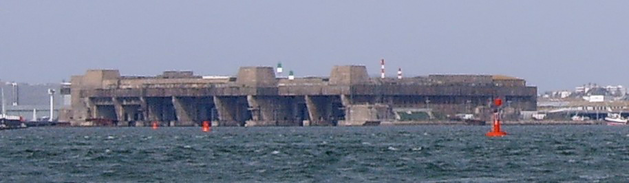 Lorient submarine base, april 2007